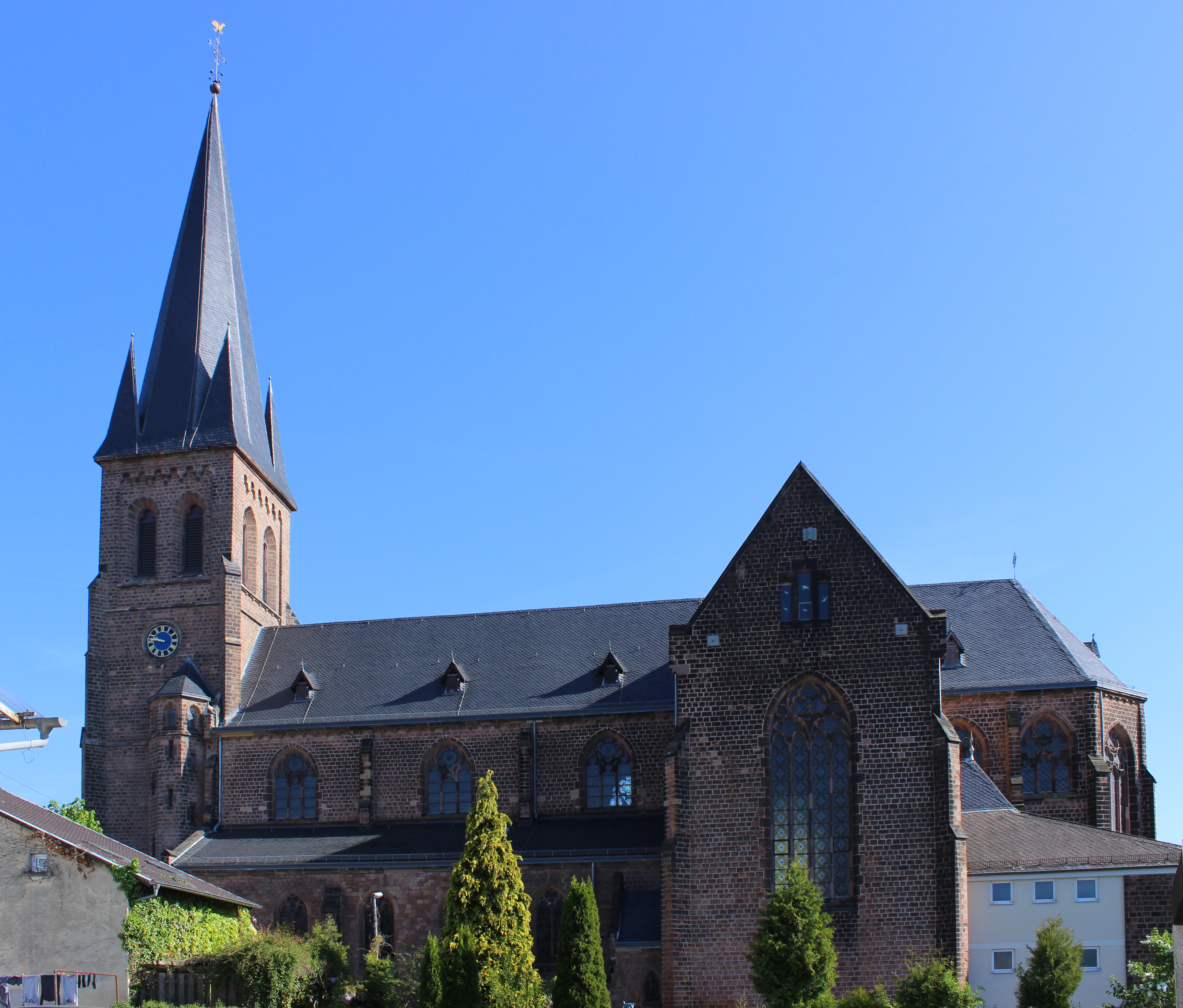 Die katholische Pfarrkirche Herz Jesu in Landsweiler-Reden, einem Ortsteil von Schiffweiler, Landkreis Neunkirchen, Saarland